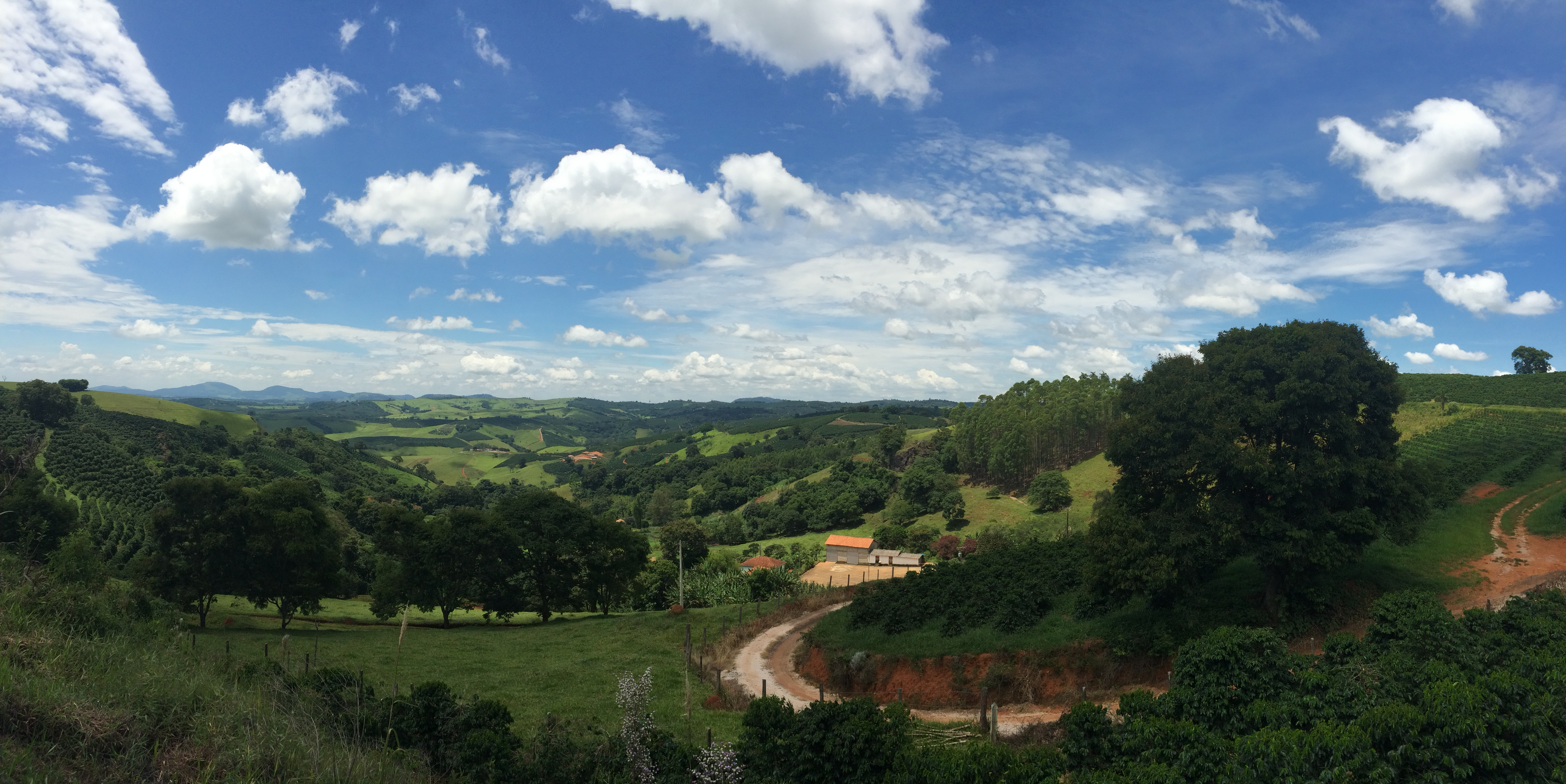 Montanhas de Minas Gerais